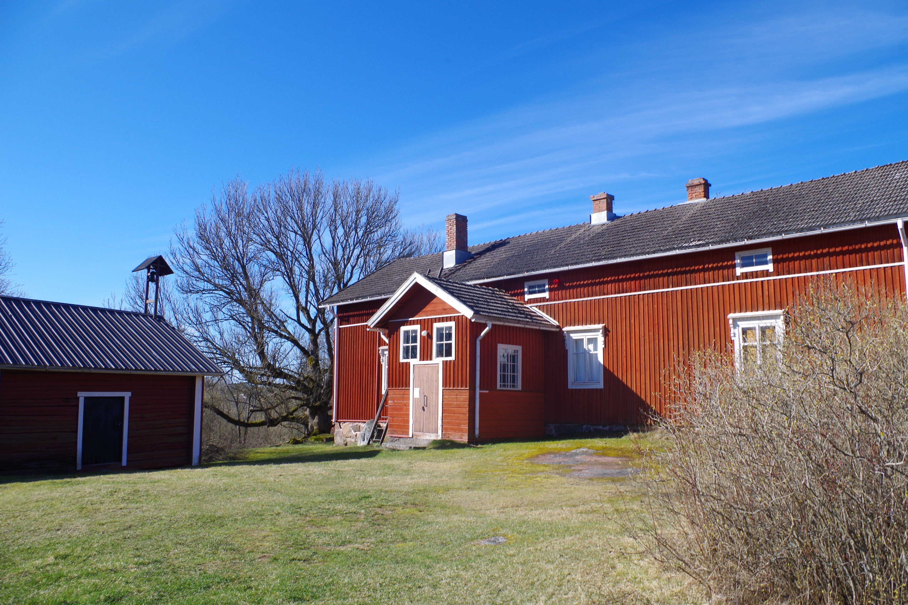 Huolilan talo Vehmaan Lahdingossa, joka toimii nykyään kotiseutumuseona.